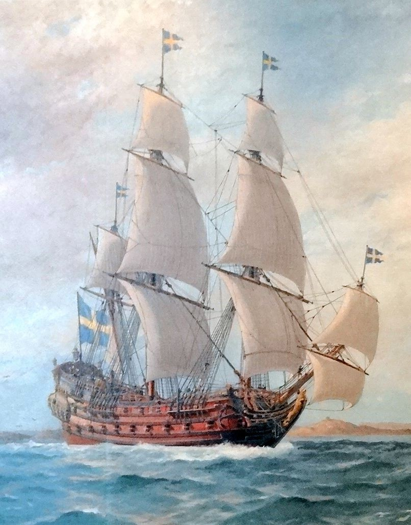 detail